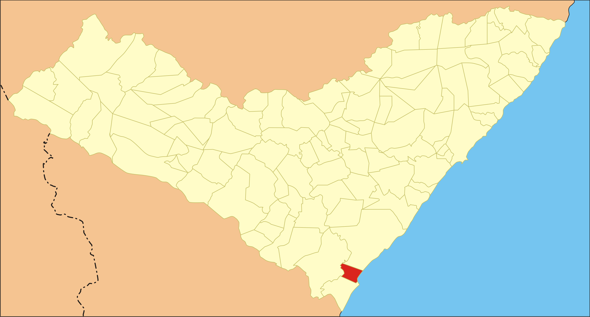 Localização da cidade em Alagoas